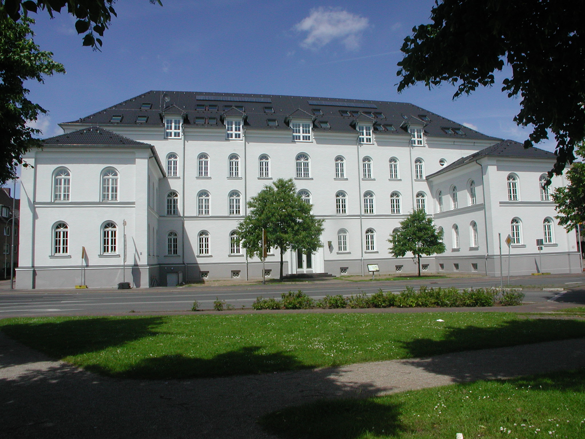 Altbau der Gymnasium Adolfinum Moers Frontalansicht